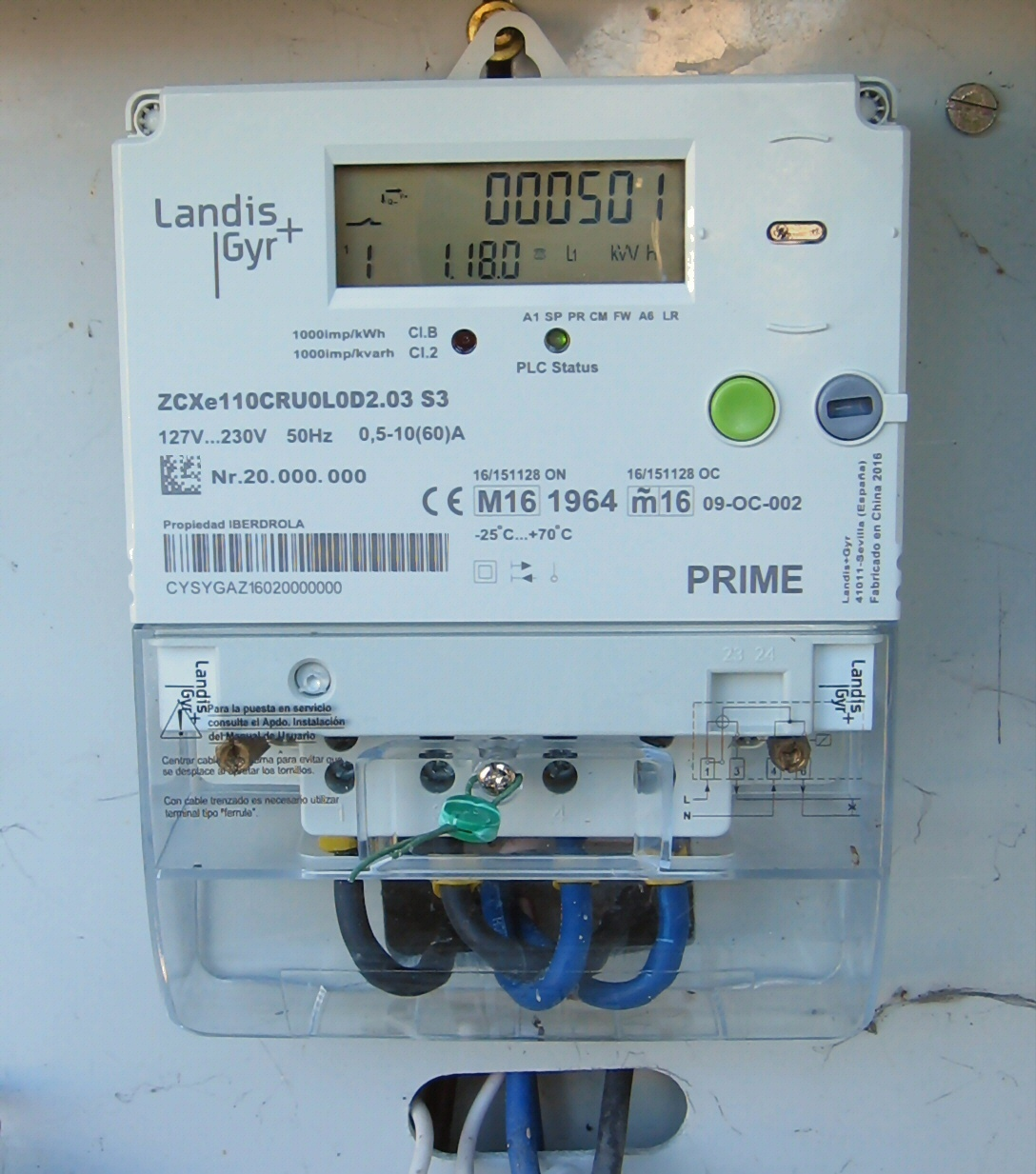 Contador de energía eléctrica doméstico electrónico. Vatihorímetro